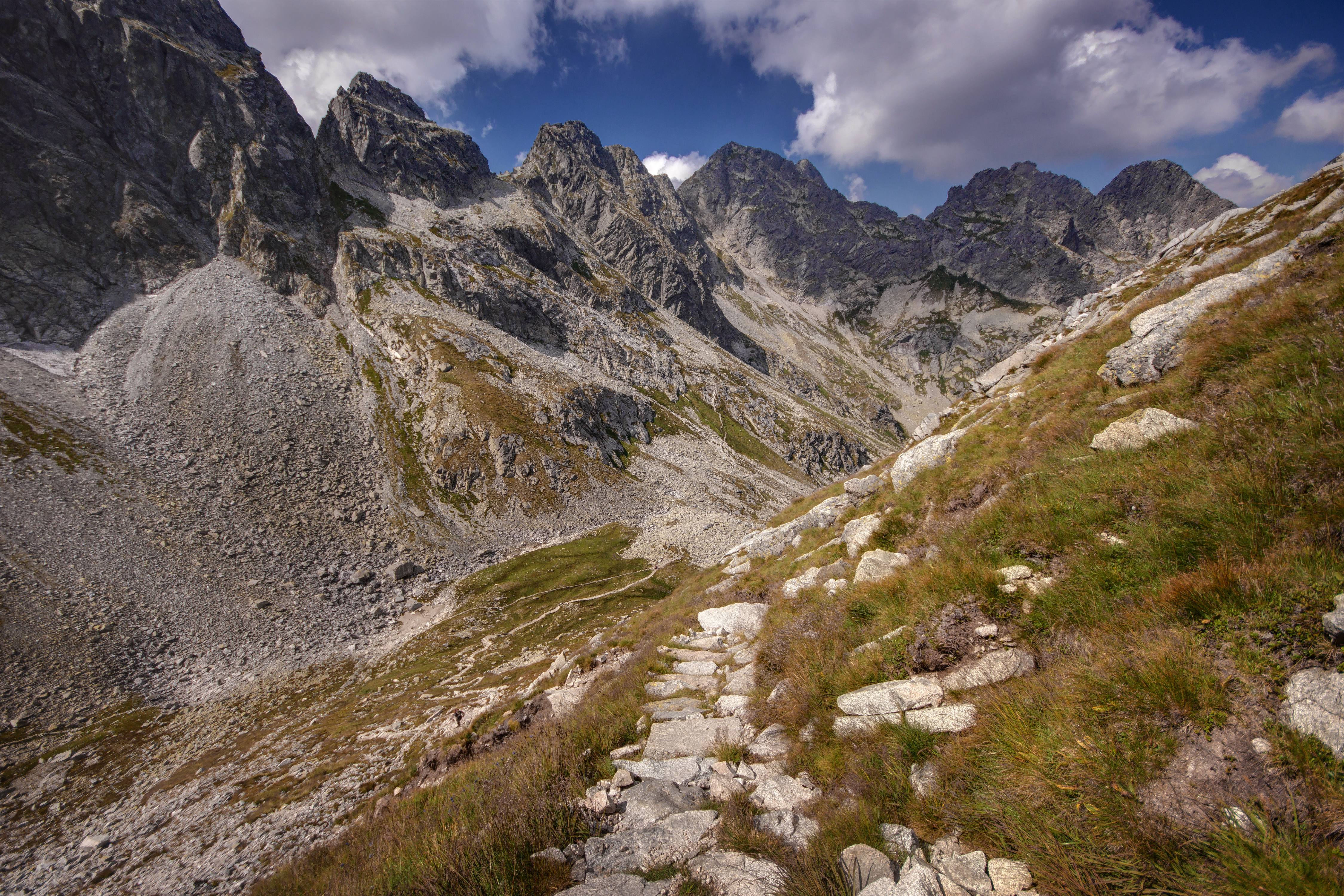 Specjalny obszar ochrony siedlisk: Tatry Kozia Dolinka - szlak na Zadni Granat This is a photography of protected area with CRFOP ID PL.ZIPOP.1393.N2K.PLC120001.H